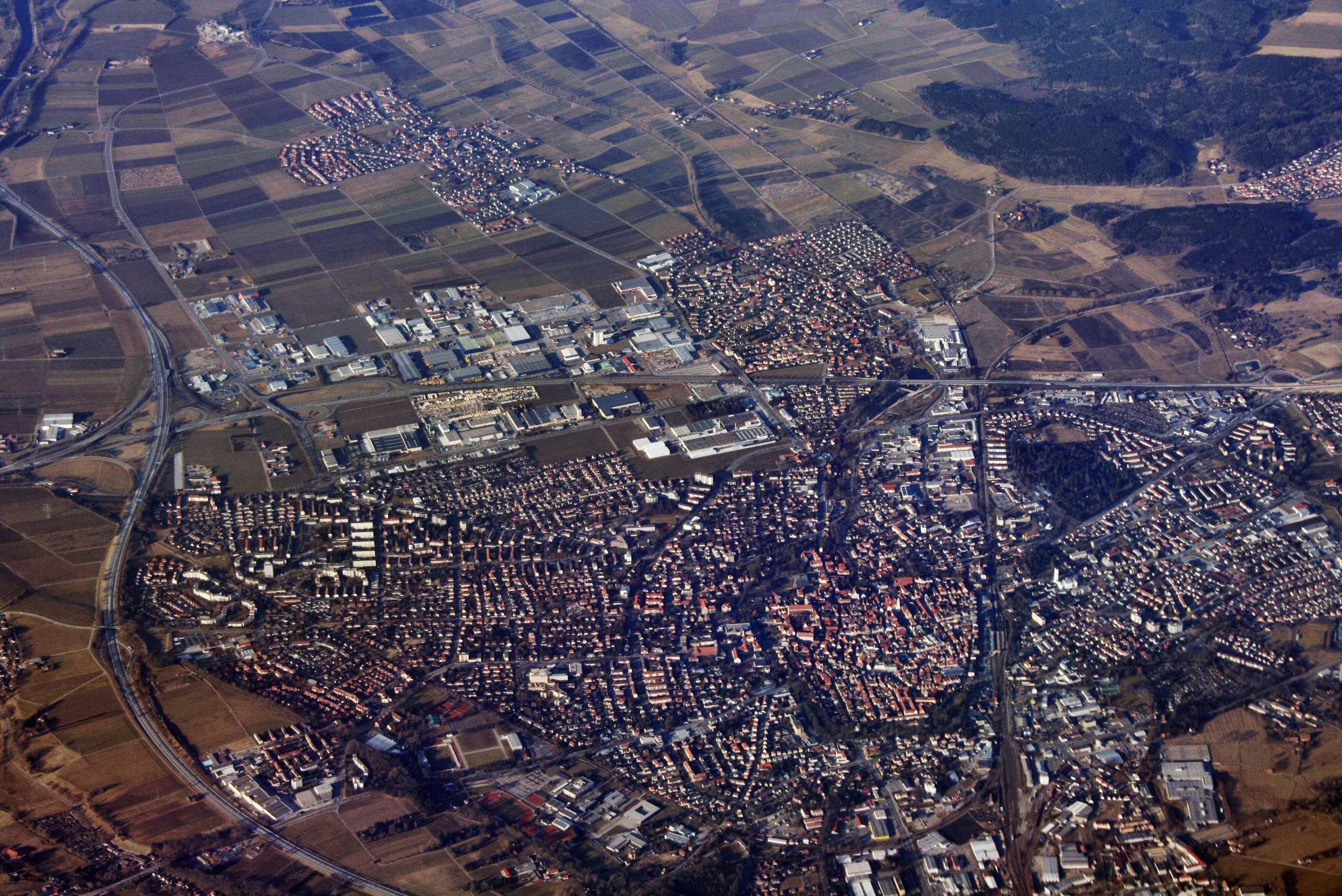 Luftaufnahme von Memmingen